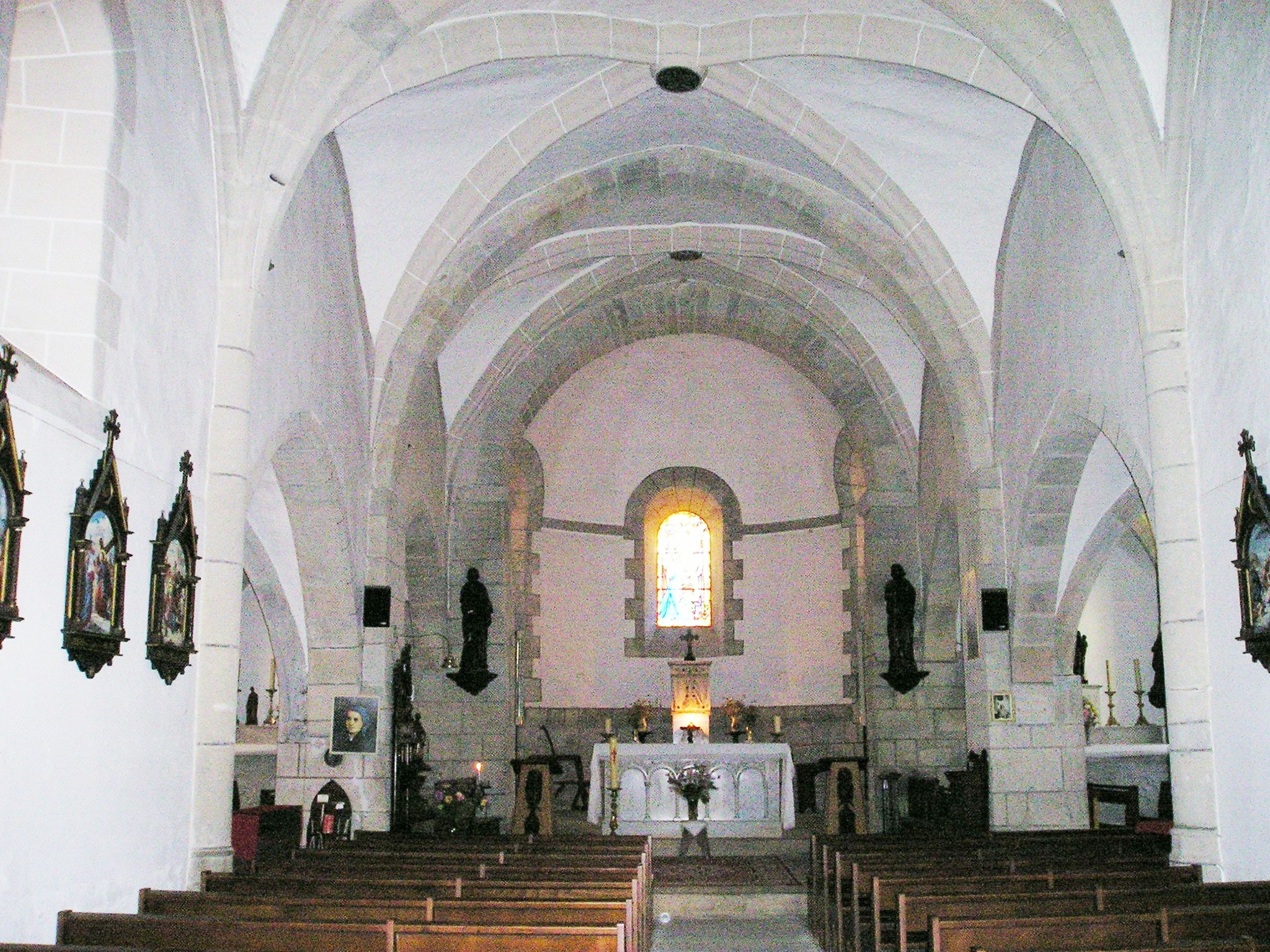 Larodde,_Kircheninneres